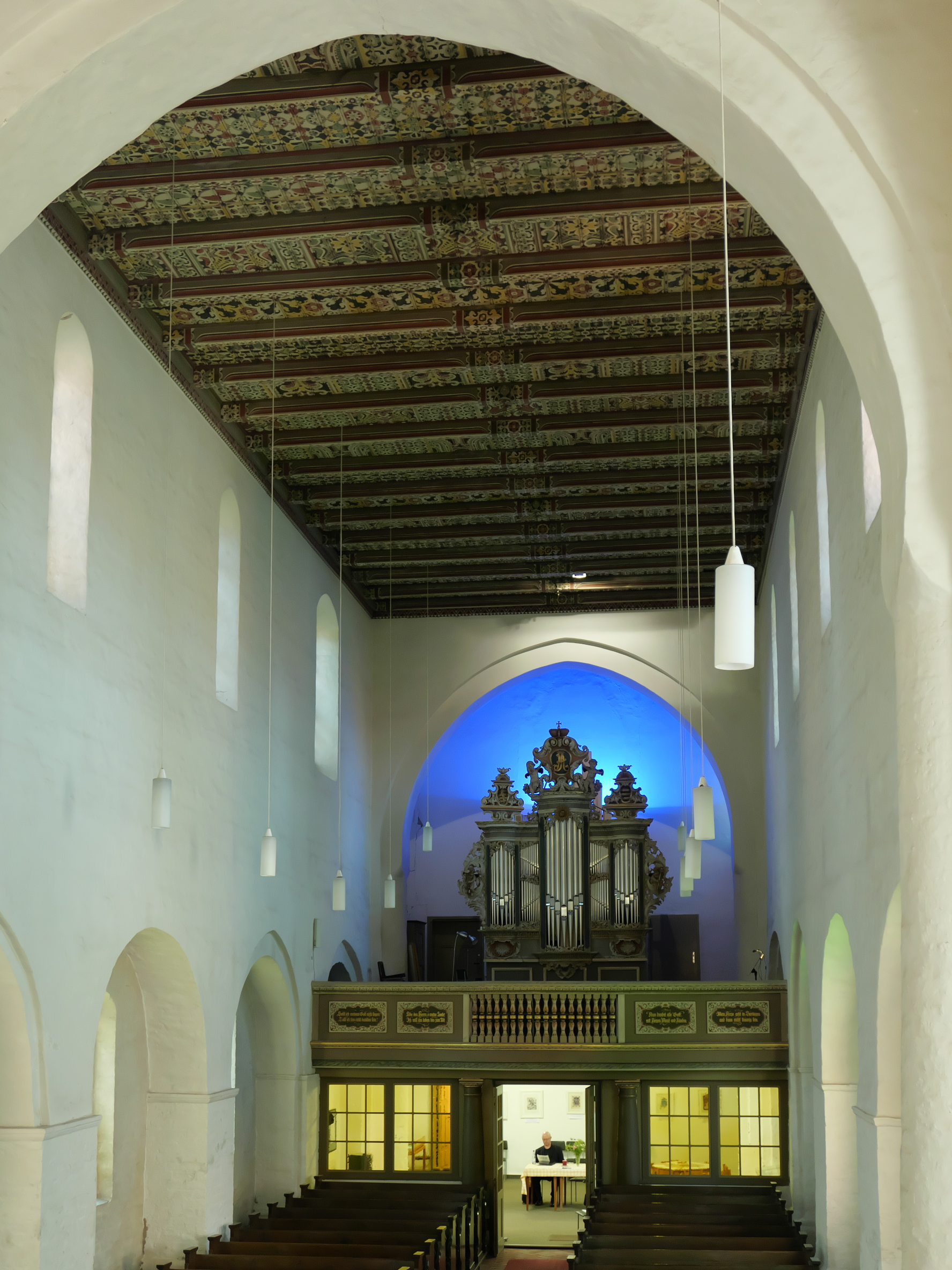 Hauptschiff und Orgelempore der Liebfrauenkirche, Jüterbog, Brandenburg, Deutschland